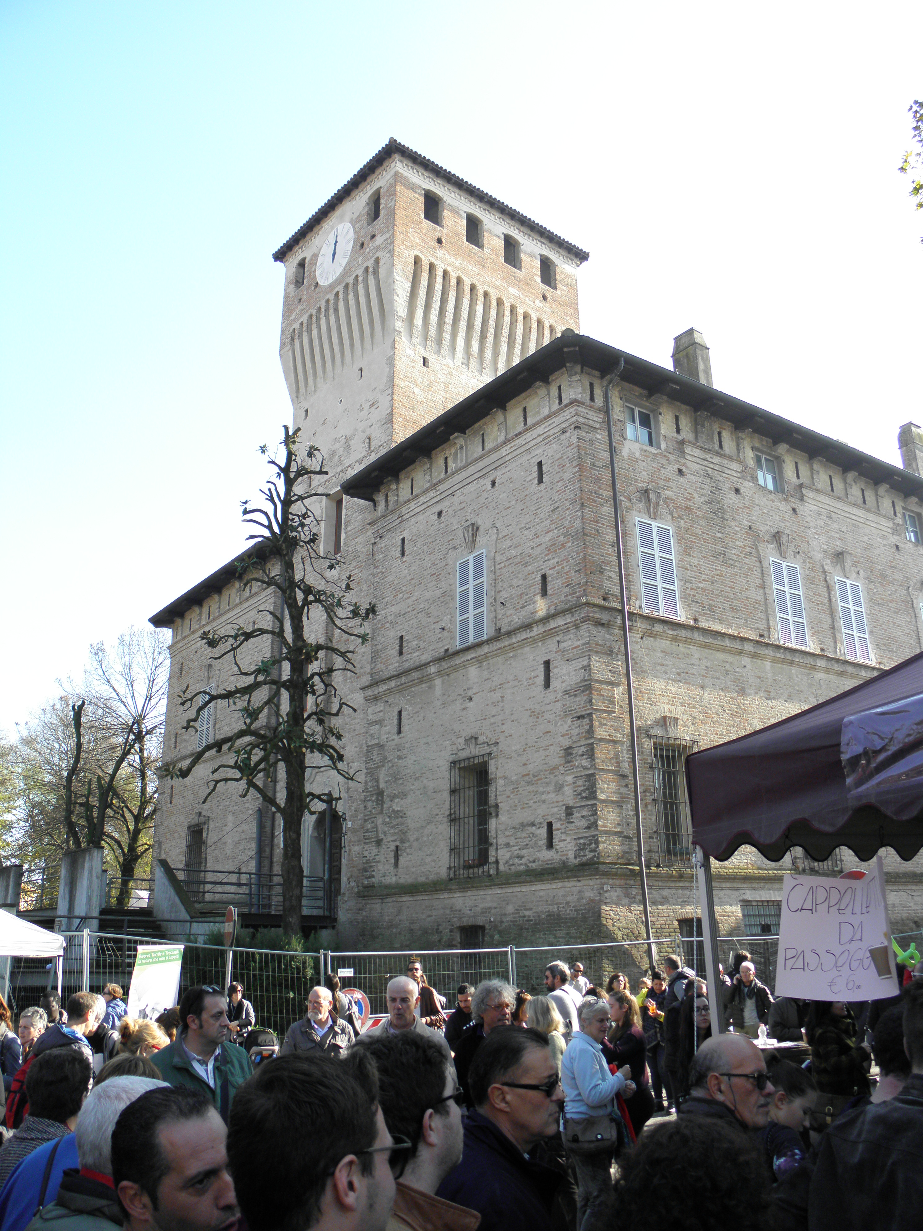 Sissa, già comune autonomo, frazione di Sissa Trecasali: November Porc edizione 2015, con gente, bancarelle e Rocca dei Terzi.